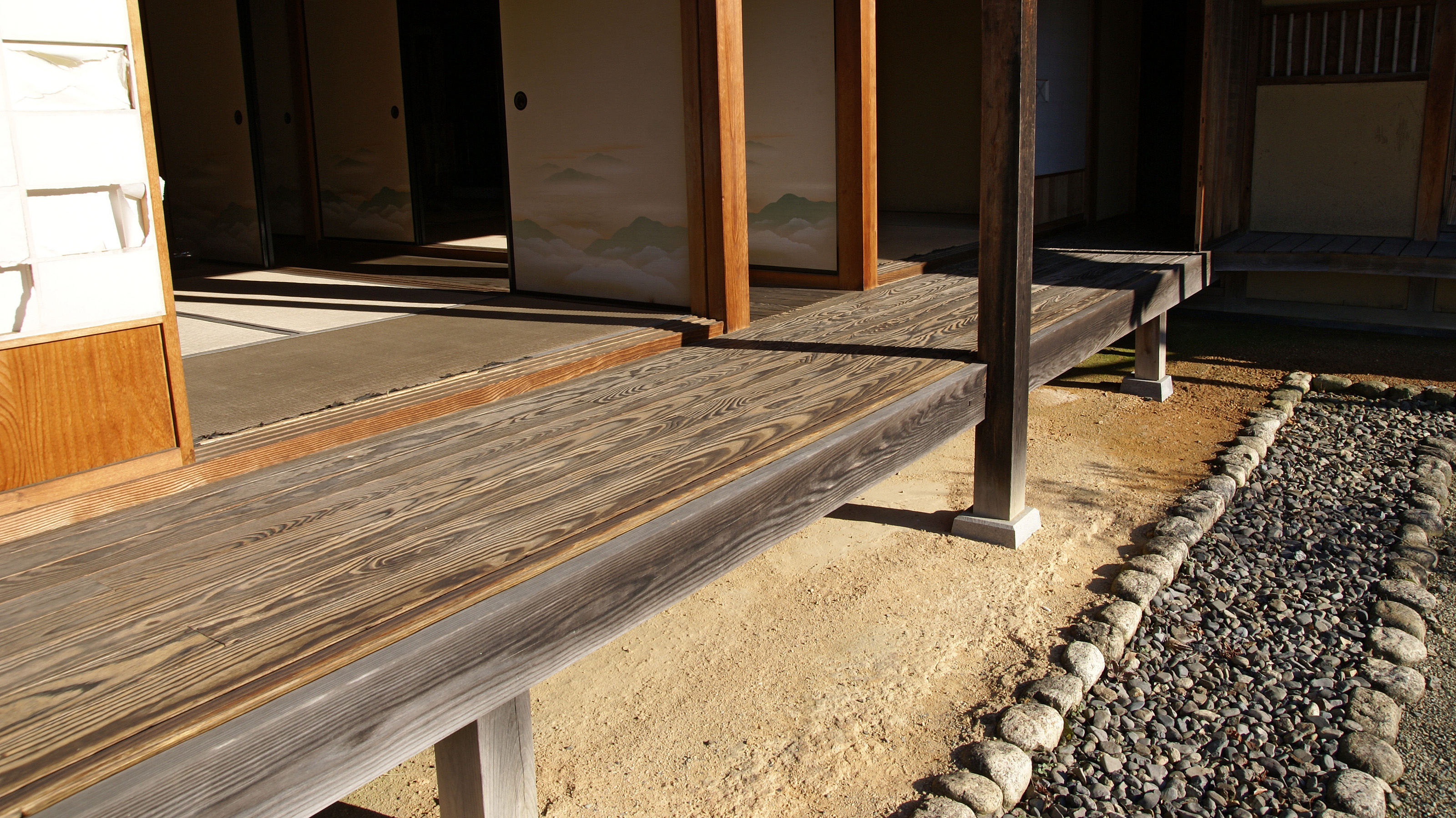 Ishibe-shukuba-no-sato in Konan, Shiga, Japan